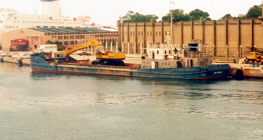 Draga San Pedro (BD-12) en el Puerto de Santo Domingo